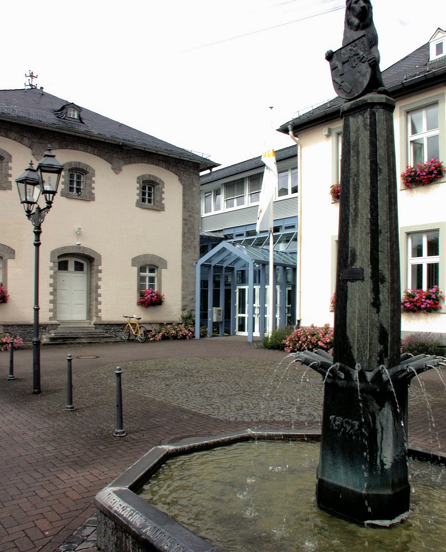 Rathaus der Verbandsgemeinde Wallmerod. Das heutige Standesamt (links) diente bis 1960 als Gefängnis.